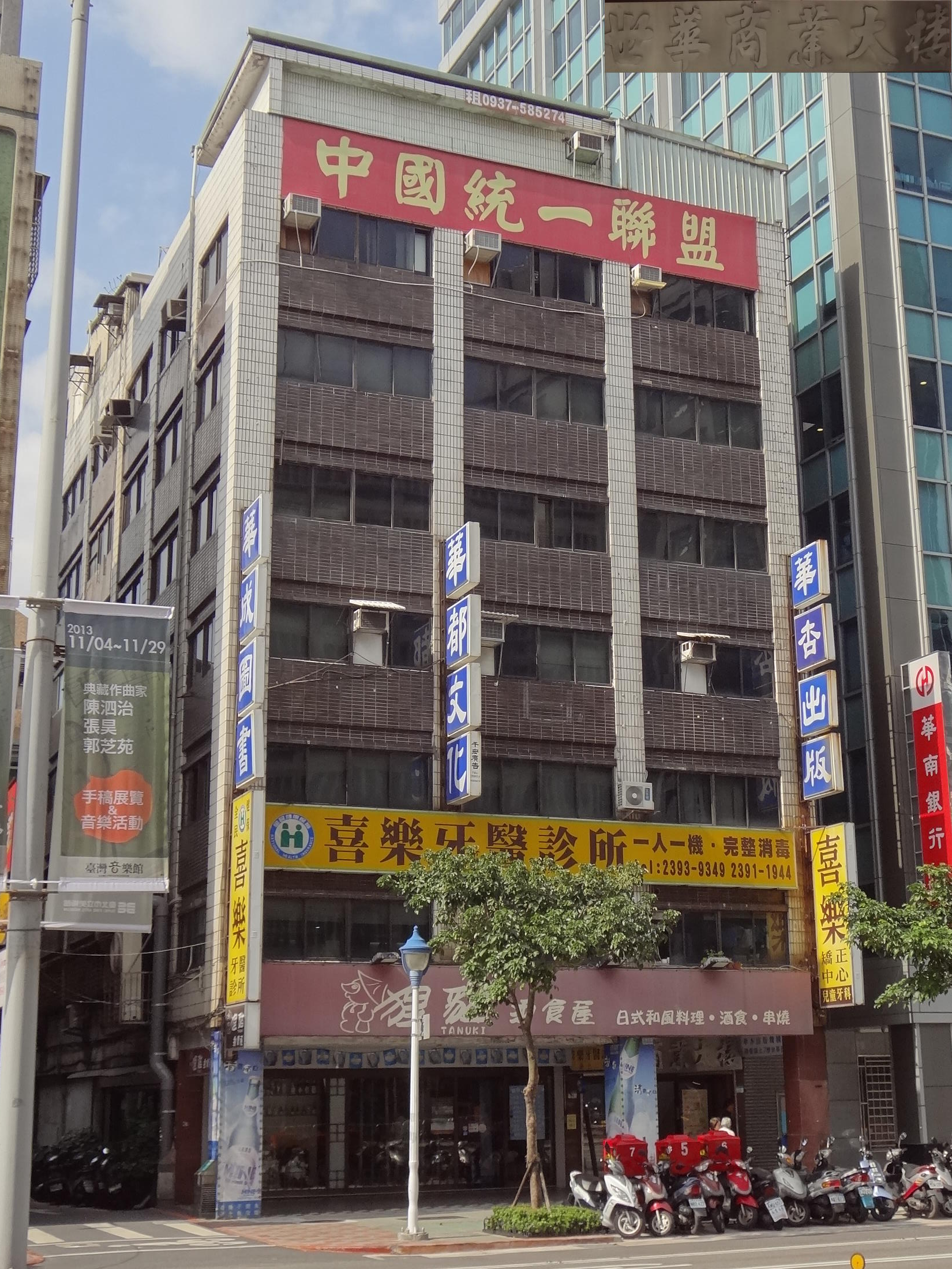 世華商業大樓，位於臺北市中正區新生南路一段50之1至50之2號，中國統一聯盟總部設於50之1號7樓，華杏出版機構（華杏出版、匯華圖書、華都文化、華成圖書）總部設於50之2號7樓。